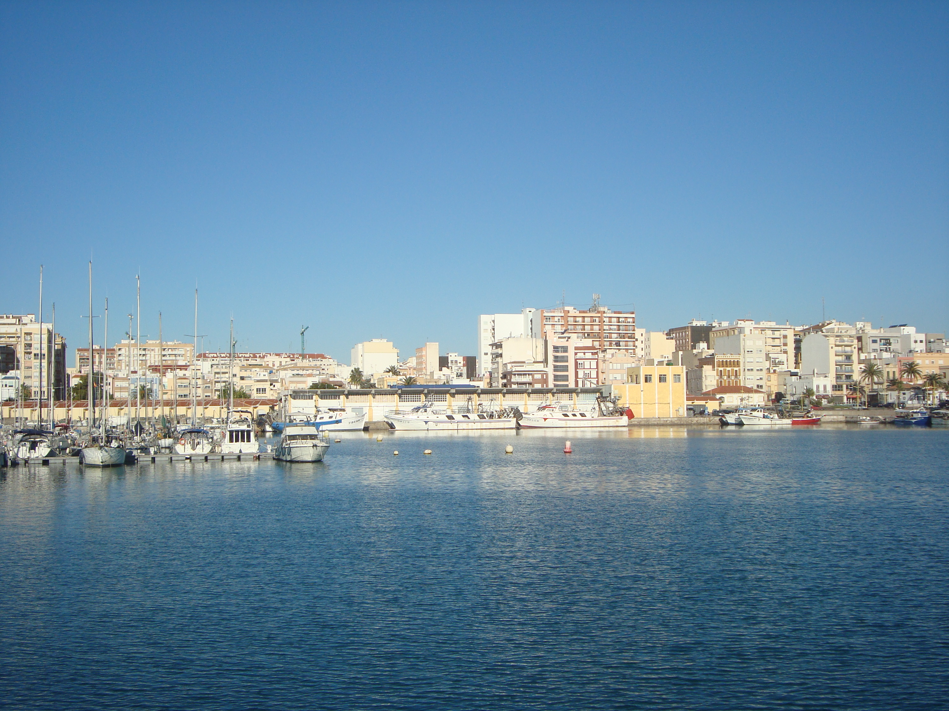 Port de Vinaròs 03.138-031.